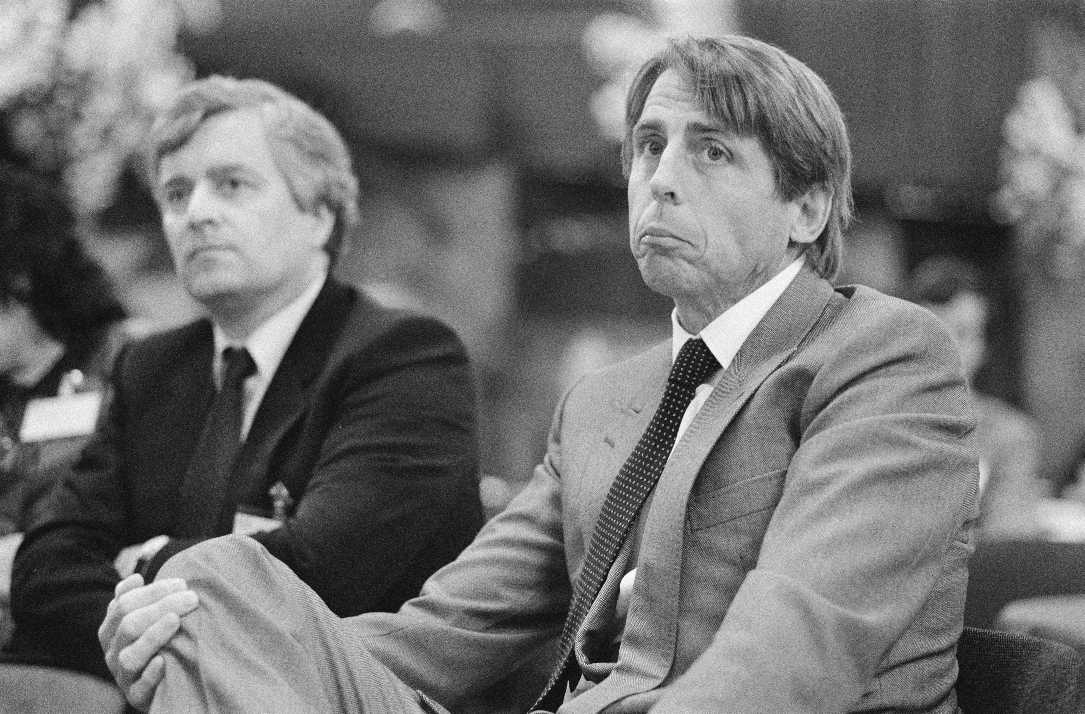 Collectie / Archief : Fotocollectie Anefo Reportage / Serie : [ onbekend ] Beschrijving : Rotterdam Oil Symposium; vrije oliehandelaar mr. J. Chr. M. A. M. Deuss (Transworld Oil) Datum : 12 april 1989 Locatie : Rotterdam, Zuid-Holland Trefwoorden : conferenties, oliemaatschappijen Persoonsnaam : Deuss, J.Chr.M.A.M. Fotograaf : Croes, Rob C. / Anefo Auteursrechthebbende : Nationaal Archief Materiaalsoort : Negatief (zwart/wit) Nummer archiefinventaris : bekijk toegang 2.24.01.05 Bestanddeelnummer : 934-4364